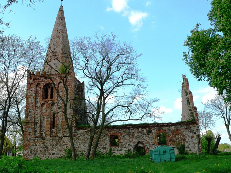 Płońsko - Ruiny kościoła